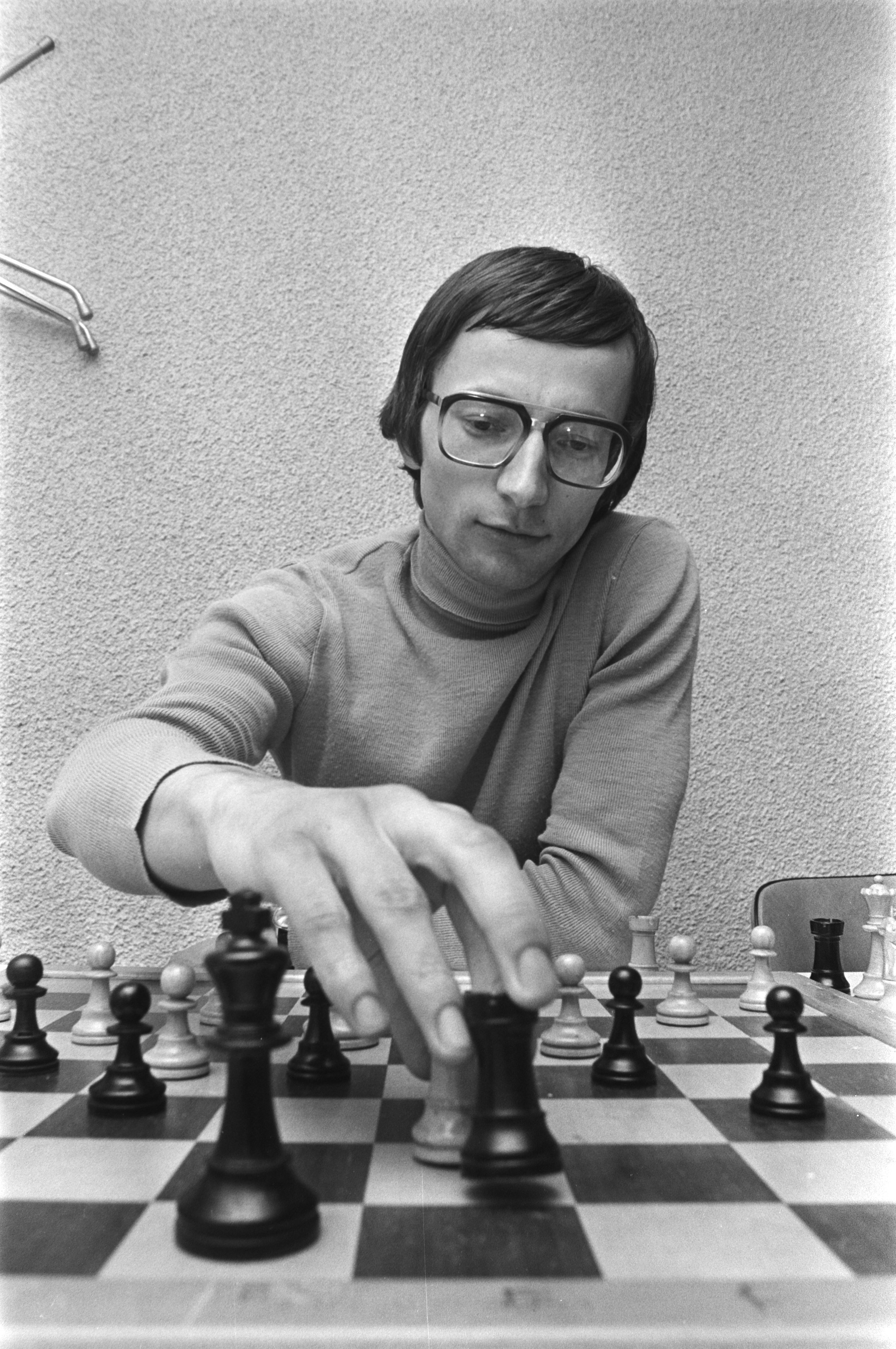 Collectie / Archief : Fotocollectie Anefo Reportage / Serie : [ onbekend ] Beschrijving : Nederlandse kampioenschappen schaken Leeuwarden; Van Wijgerden aan zet Datum : 21 april 1976 Locatie : Friesland, Leeuwarden Trefwoorden : KAMPIOENSCHAPPEN, SCHAKEN Fotograaf : Bogaerts, Rob / Anefo Auteursrechthebbende : Nationaal Archief Materiaalsoort : Negatief (zwart/wit) Nummer archiefinventaris : bekijk toegang 2.24.01.05 Bestanddeelnummer : 928-5324